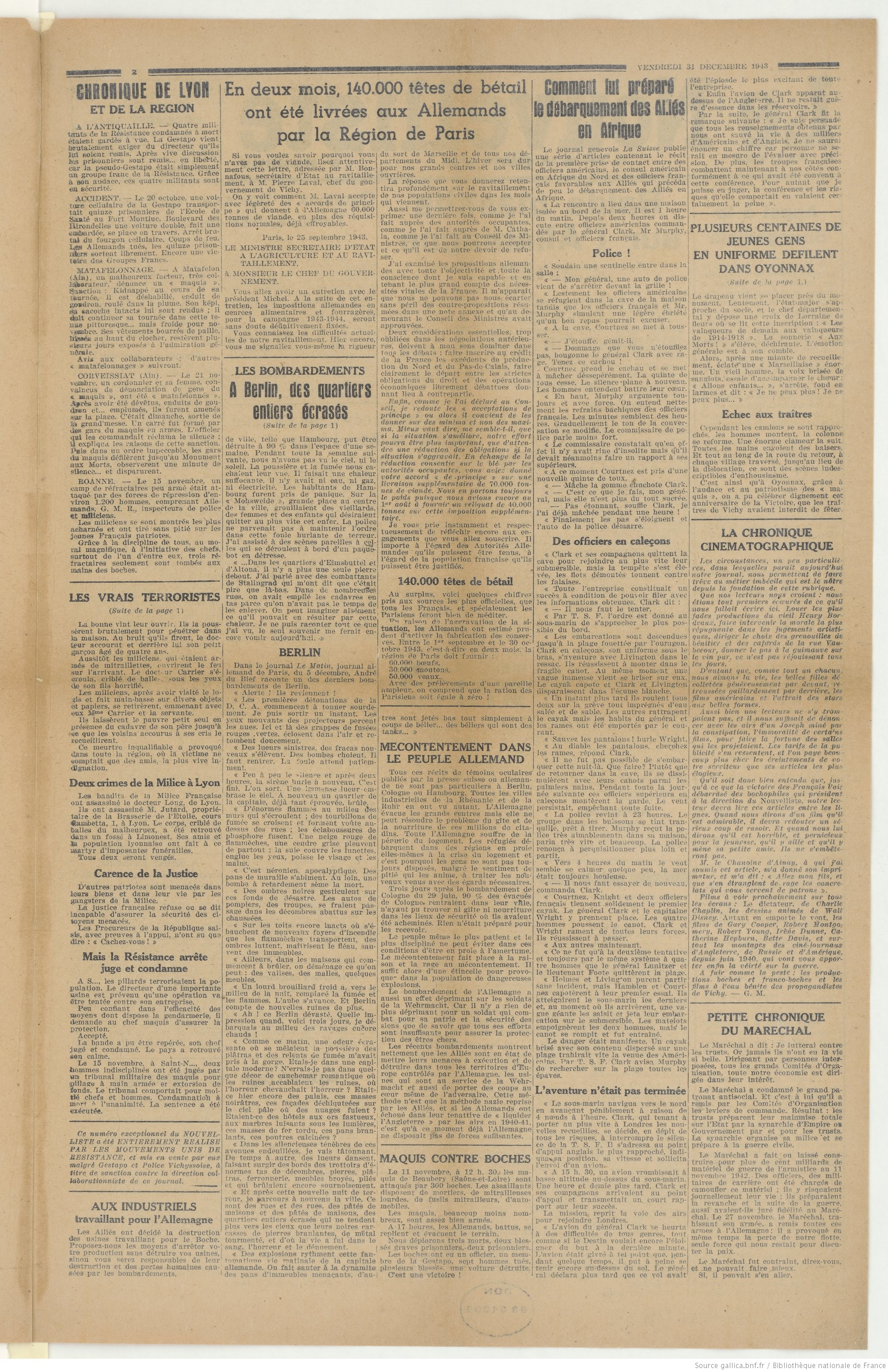 Page 2 de l'édition fictive du Nouvelliste de Lyon publiée et distribuée par les résistants lyonnais pour remplacer l'édition officielle.